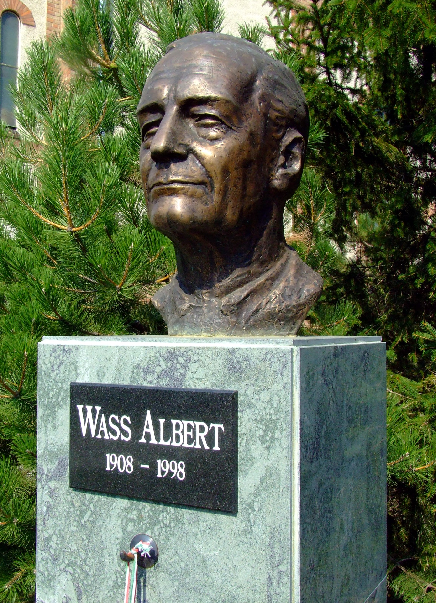 Wass Albert szobra Baján. Harmath István alkotása (2007)